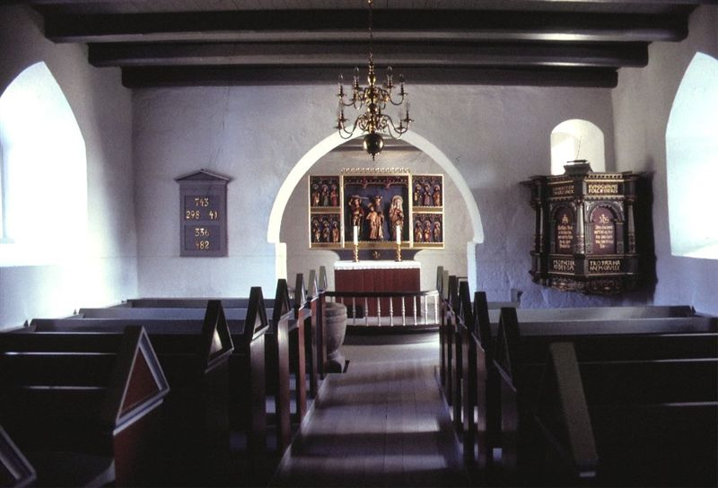 Bur Kirke i Danmark. Skibet set mod øst